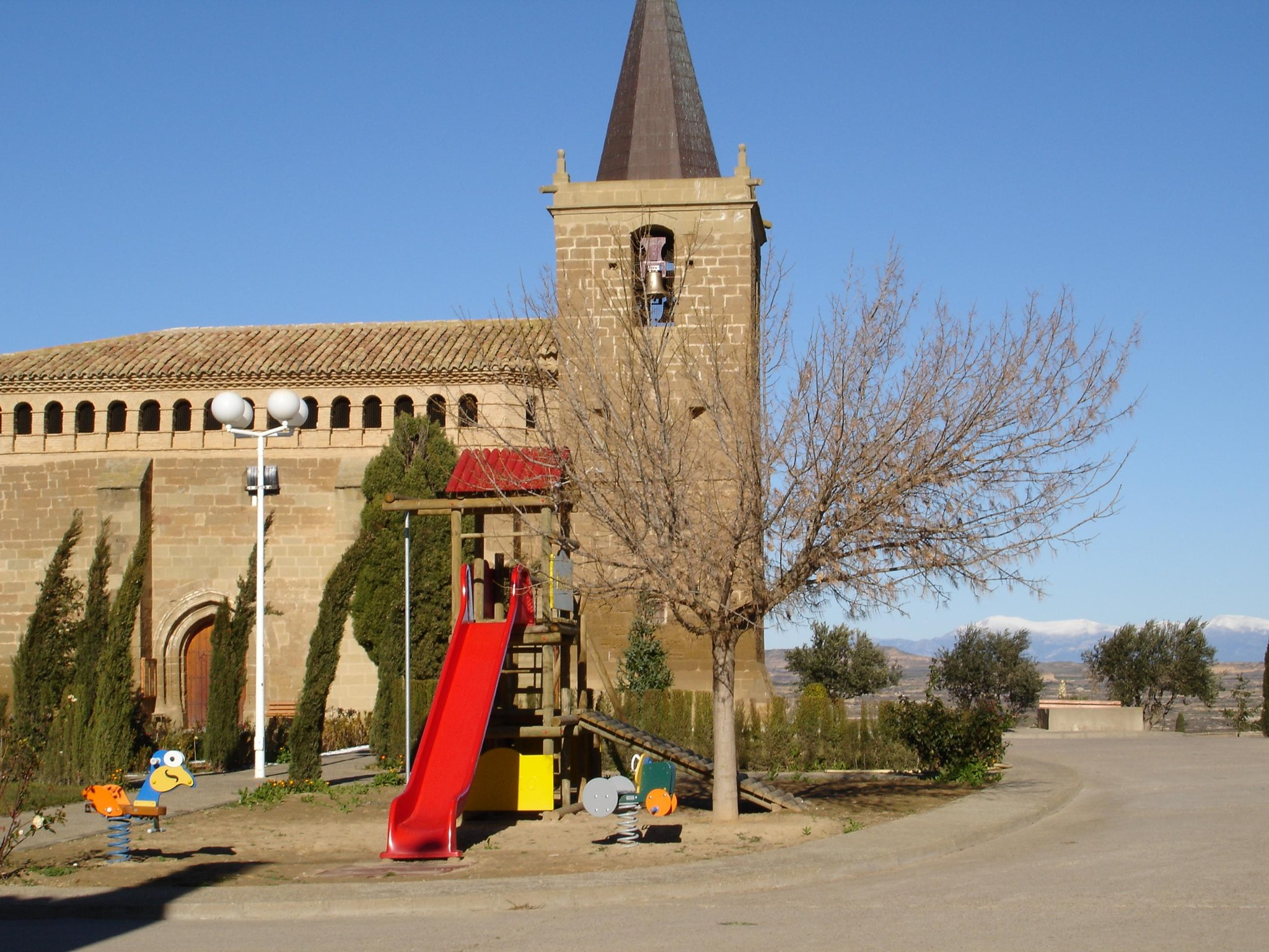 Imatge de l'església de Sant Joan Baptista de Capdesaso amb el perfil de la Serra de Guara a l'horitzó